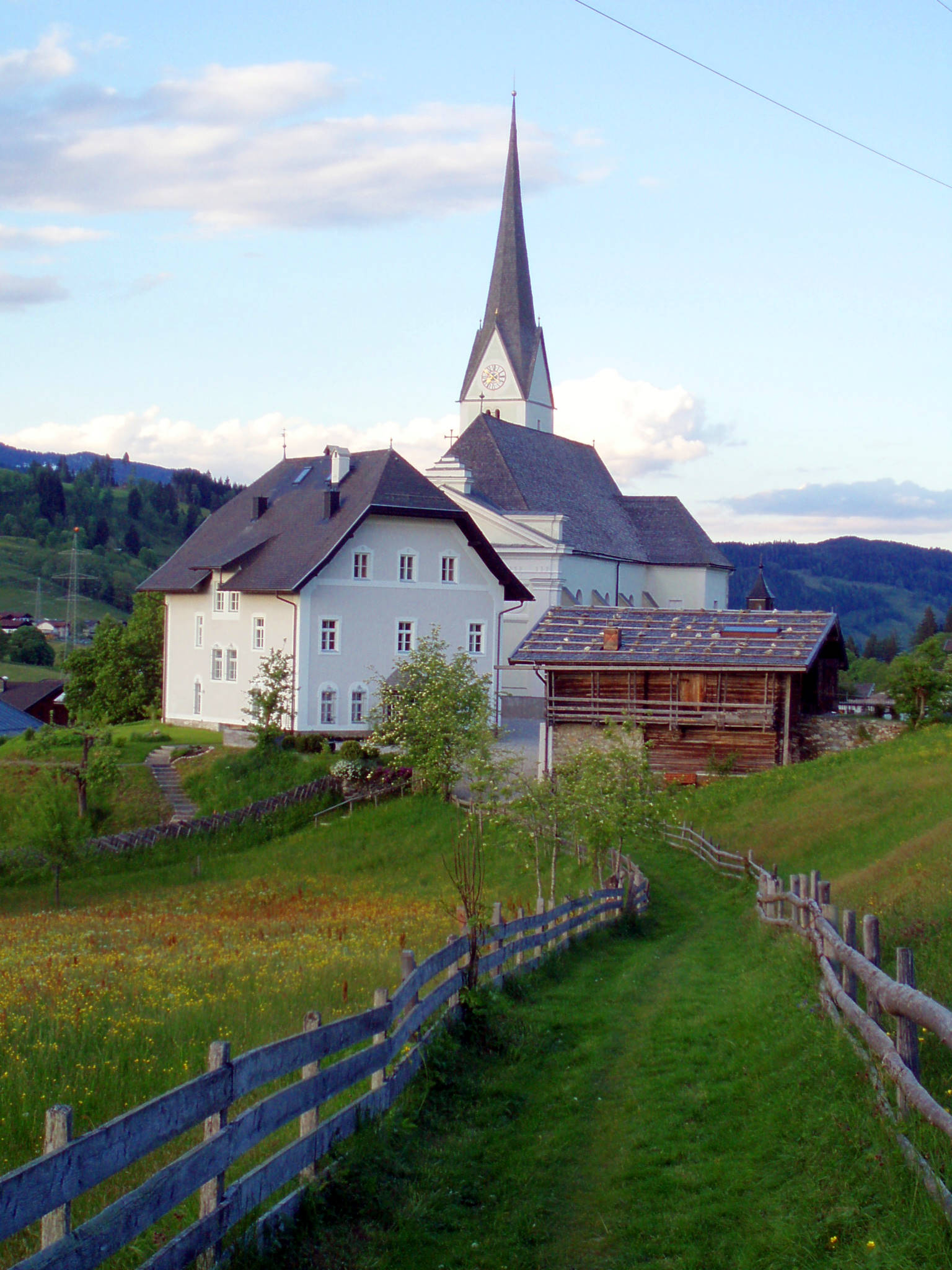 Blick auf Embach, Gemeinde Lend, Salzburg, Österreich. Pfarrhof, Kirche und Geistliches Zentrum Embach.